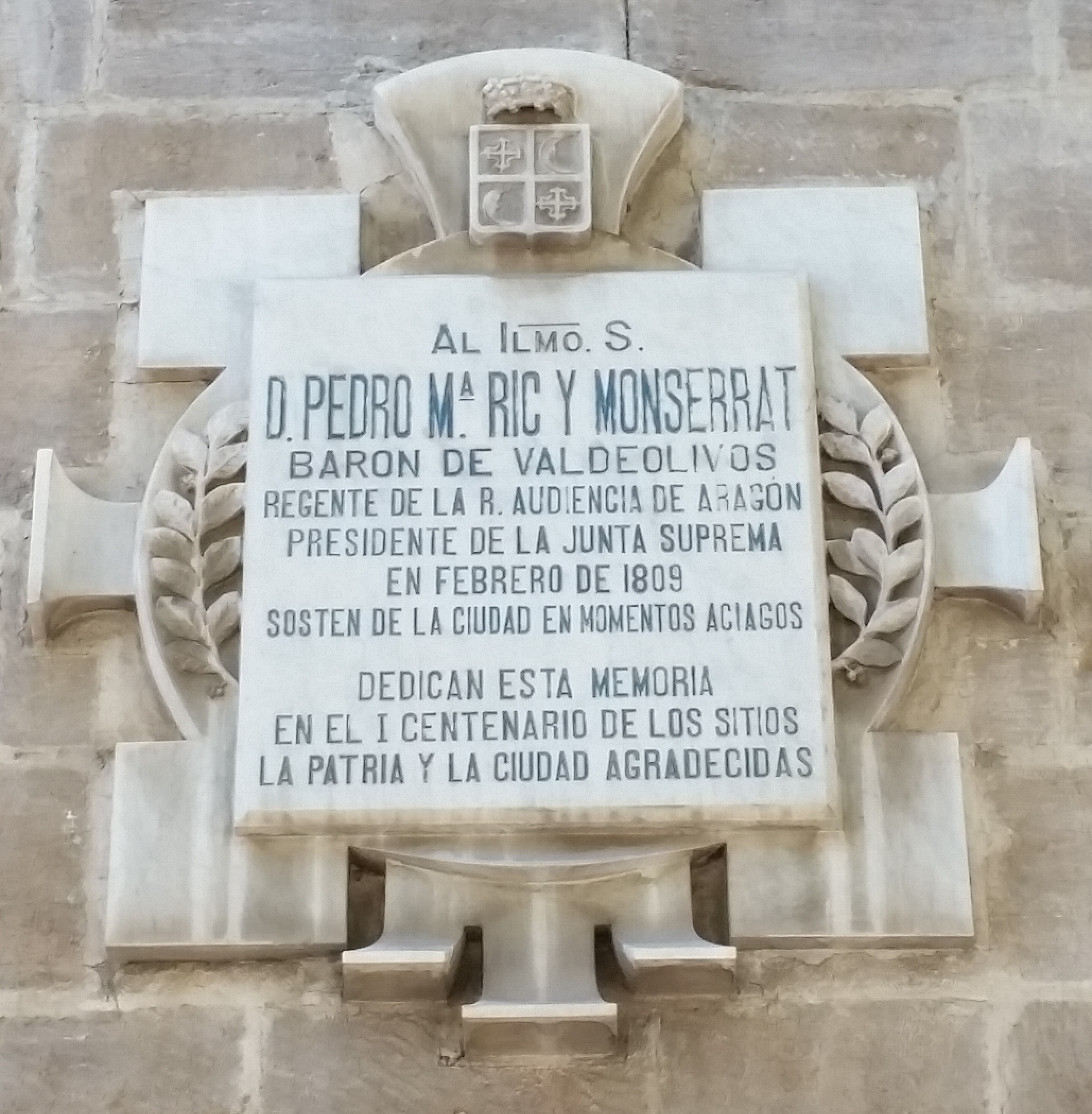 Zaragoza - Placa dedicada a Pedro María Ric y Monserrat. Barón de Valdeolivos: "Al Ilmo. S. D. Pedro Mª. Ric Y Moserrat / Barón de Valdeolicos / Regente de la R. Audiencia de aragón / Presidente de la junta Suprema / en febrero de 1809 / sostén de la ciudad en momentos aciagos / dedican esta memoria / en el I centenario de los Sitios / la Patria y la Ciudad agradecidas